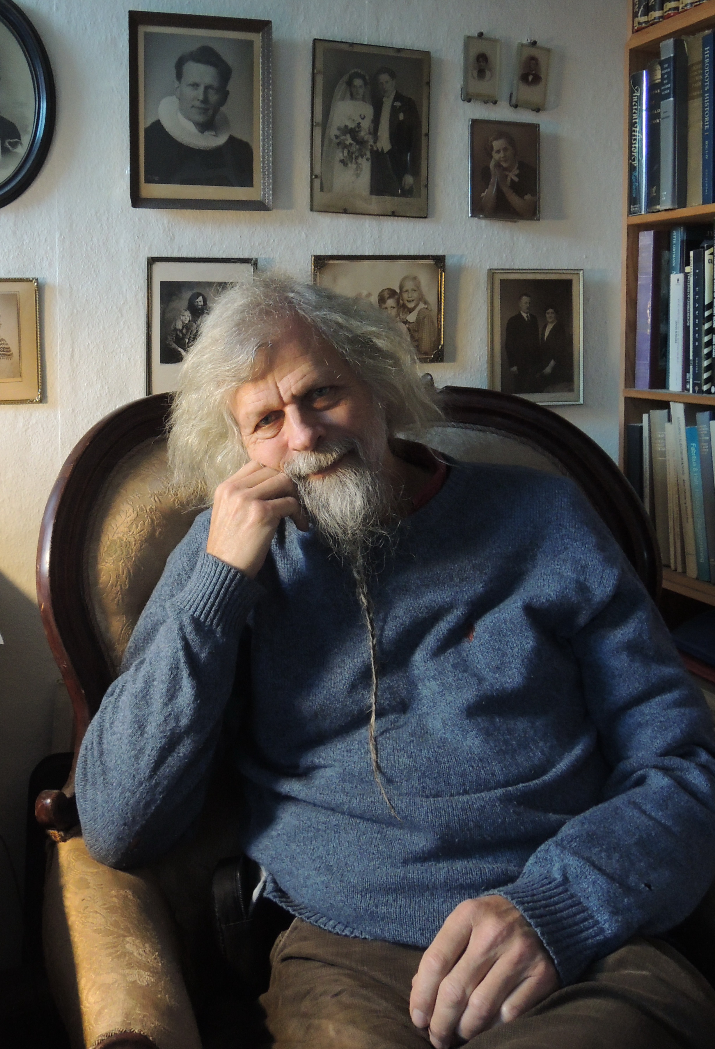 Jacob Holdt